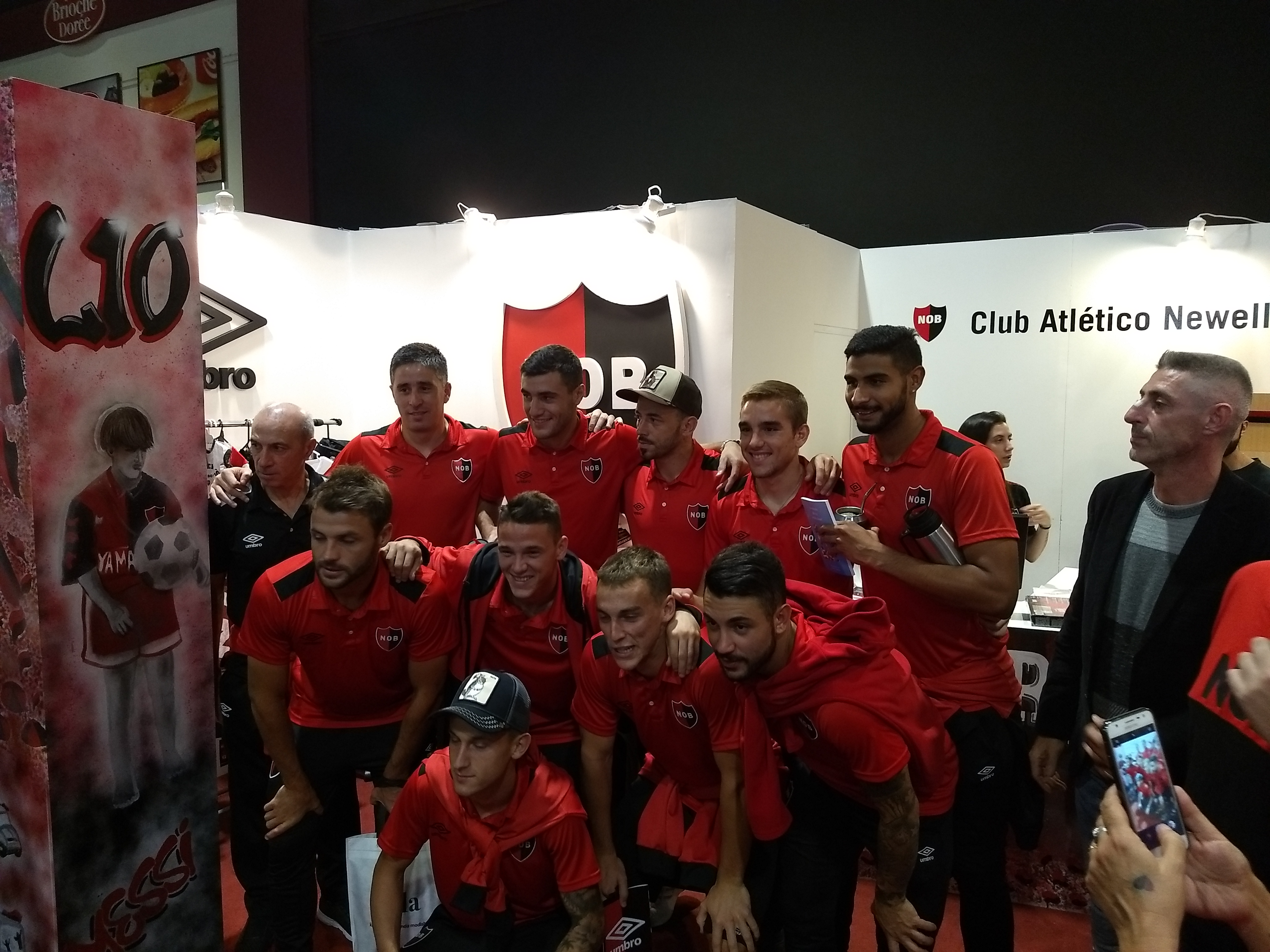 Jugadores de Newell's Old Boys en el stand del club en la Feria del Libro. A la izquierda, un dibujo de Messi basado en esta fotografía de 1992.